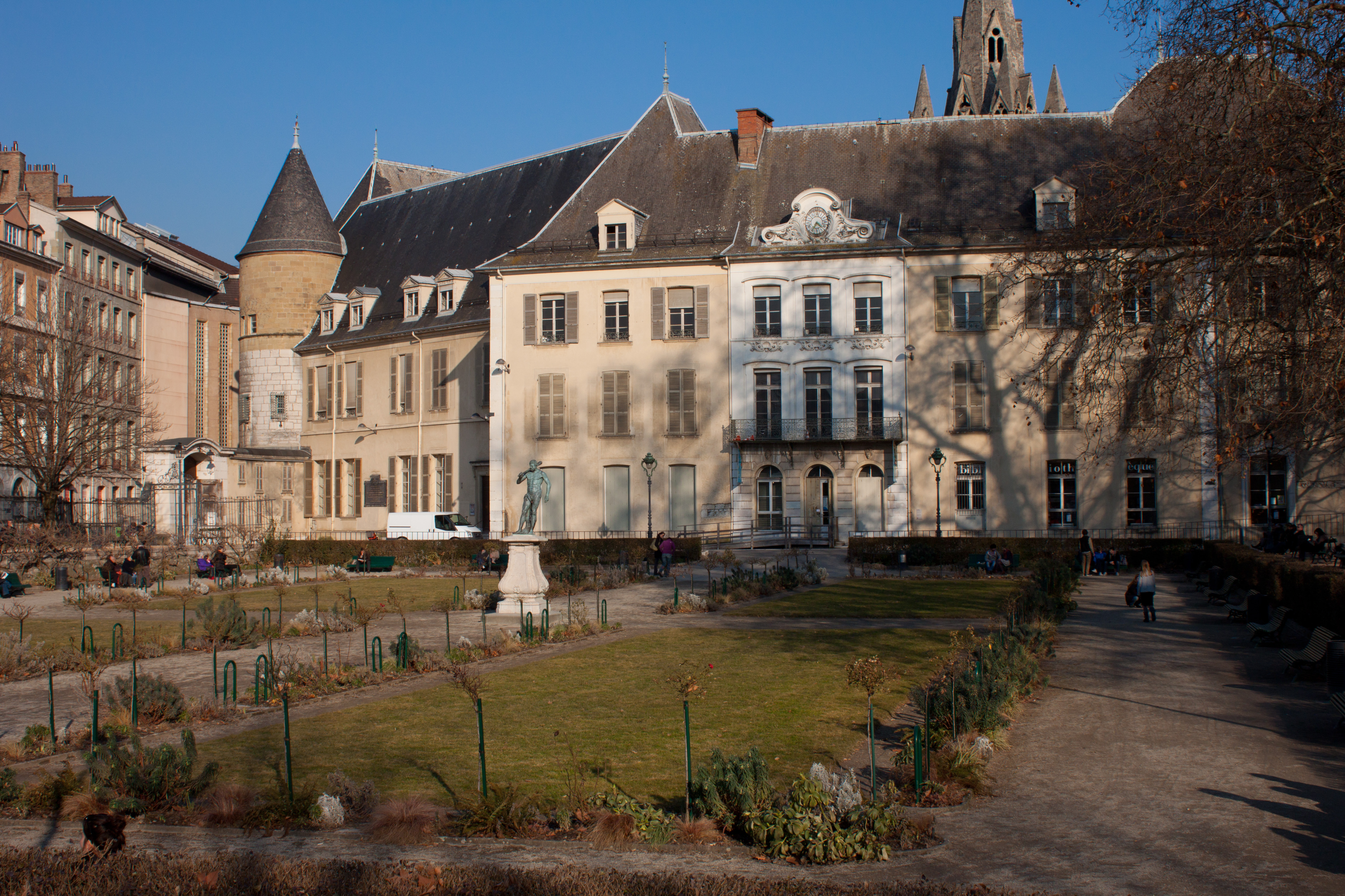 Maison de l'international, rue Hector Berlioz à Grenoble. A l'origine, Hôtel du duc De Lesdiguières bâti en 1602, il abrita de 1719 à 1967 la mairie de Grenoble. Devant, le jardin de ville.